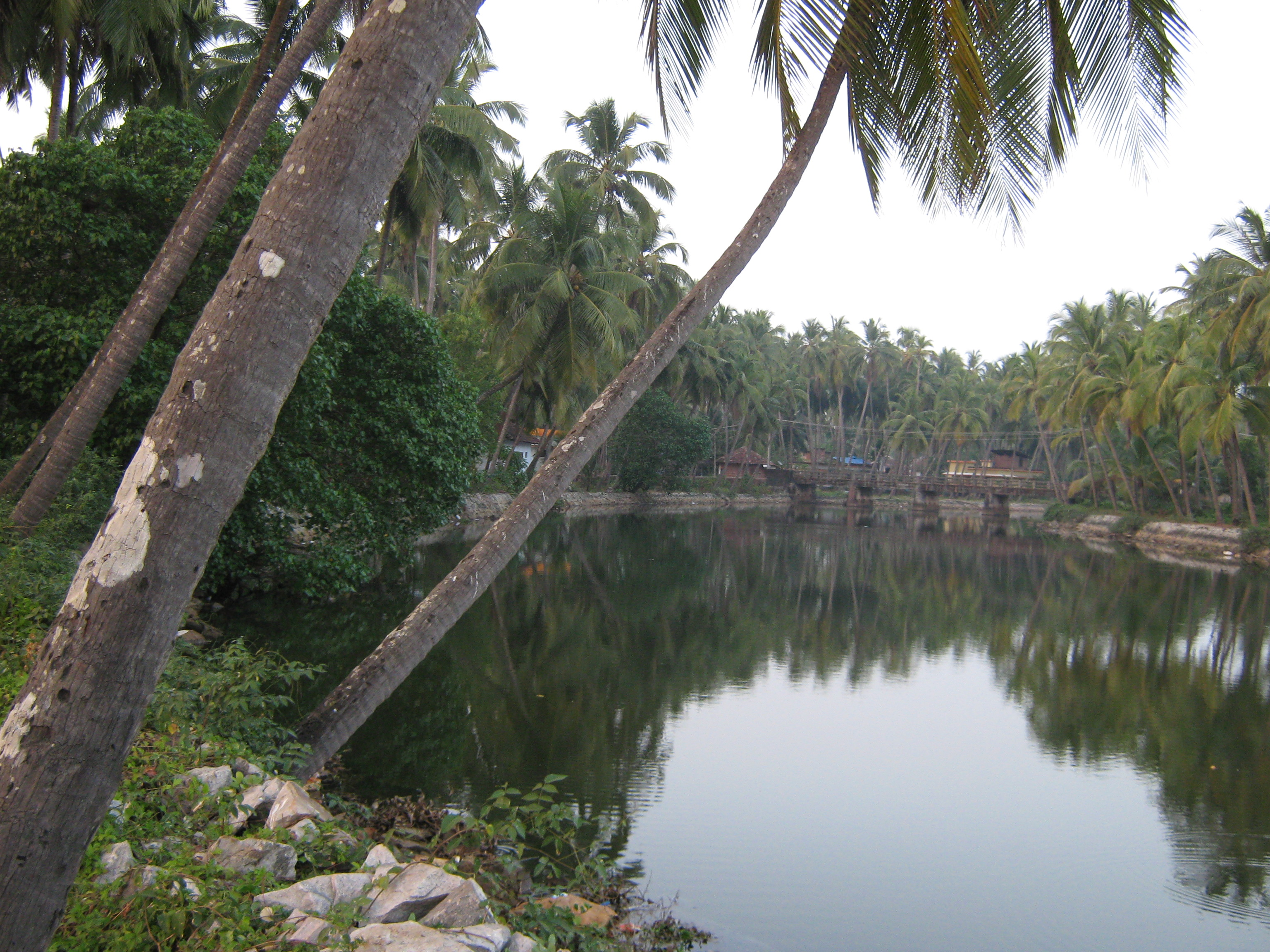 Maidanappally, Kannur, Kerala, India.